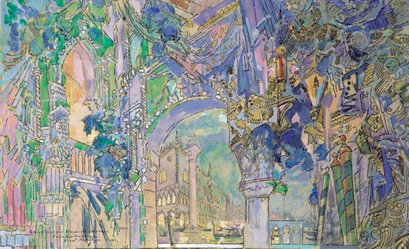 Эскиз занавеса к спектаклю LA RONDE DES HEURES